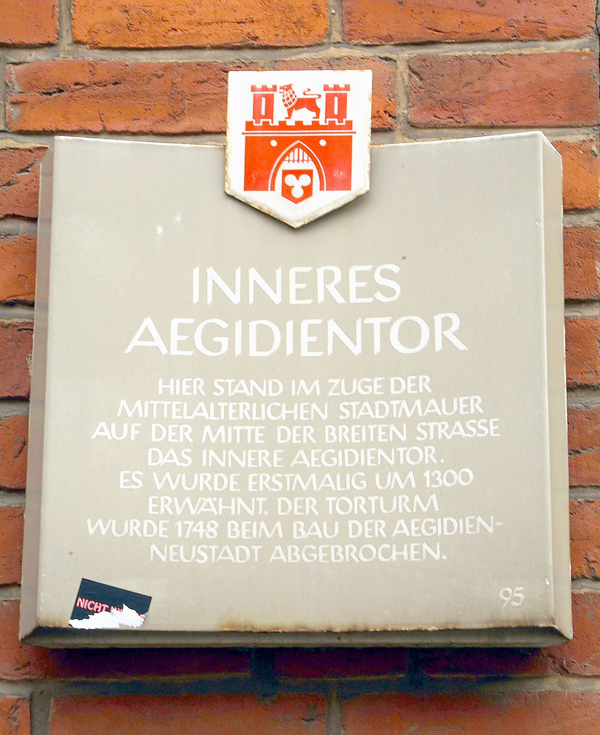 Stadttafel 95: "Inneres Aegidientor. Hier stand im Zuge der mittelalterlichen Stadtmauer auf der Mitte der Breiten Straße das Innere Aegidientor. Es wurde erstmals um 1300 erwähnt. Der Torturm wurde 1748 beim Bau der Aegidienneustadt abgebrochen ...